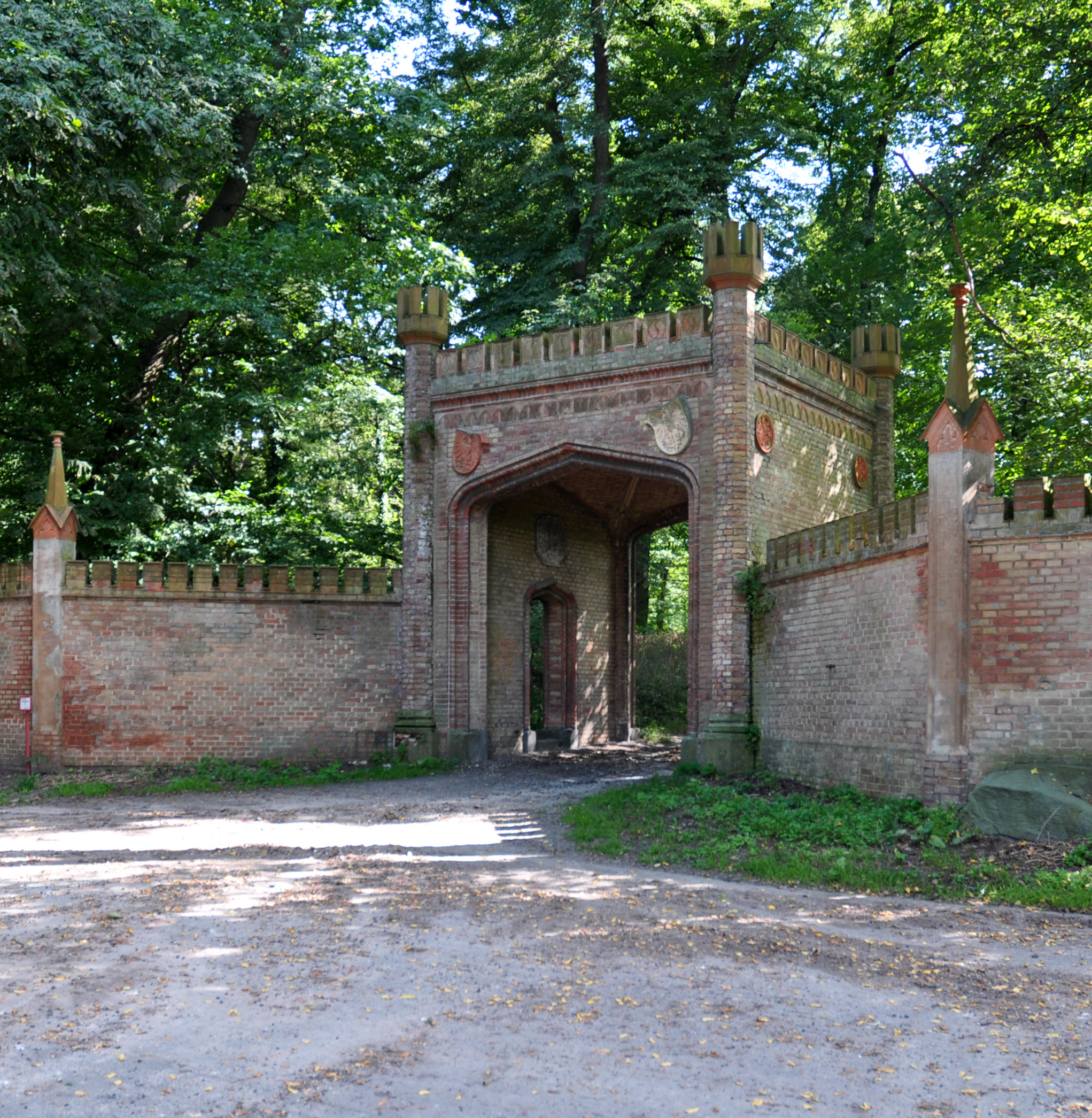 Das Jägertor vom Krughorn